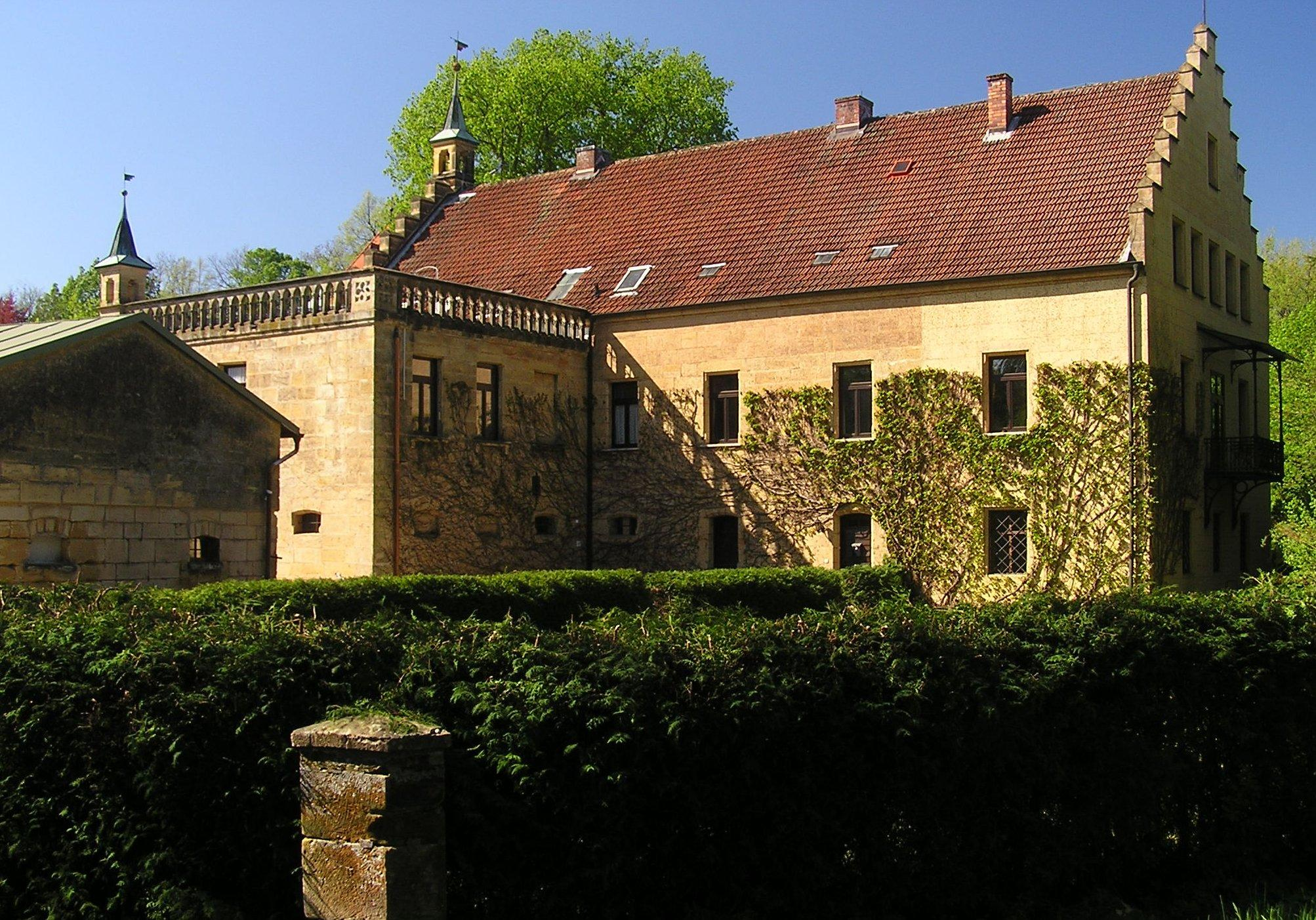 Neues Schloss in Simmelsdorf (Mittelfranken)